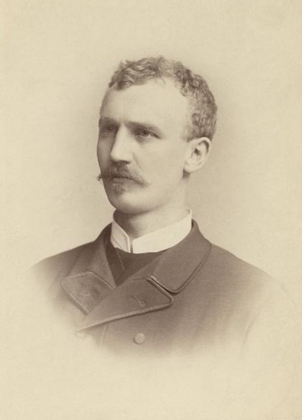 Václava Vávra (1854–1922) český herec